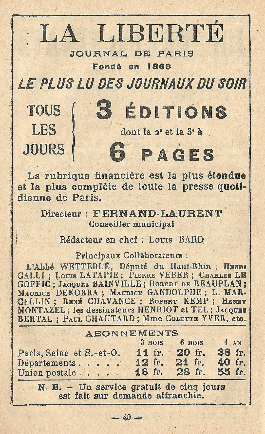 Vignette de réclame pour un journal français : La Liberté - Journal de Paris